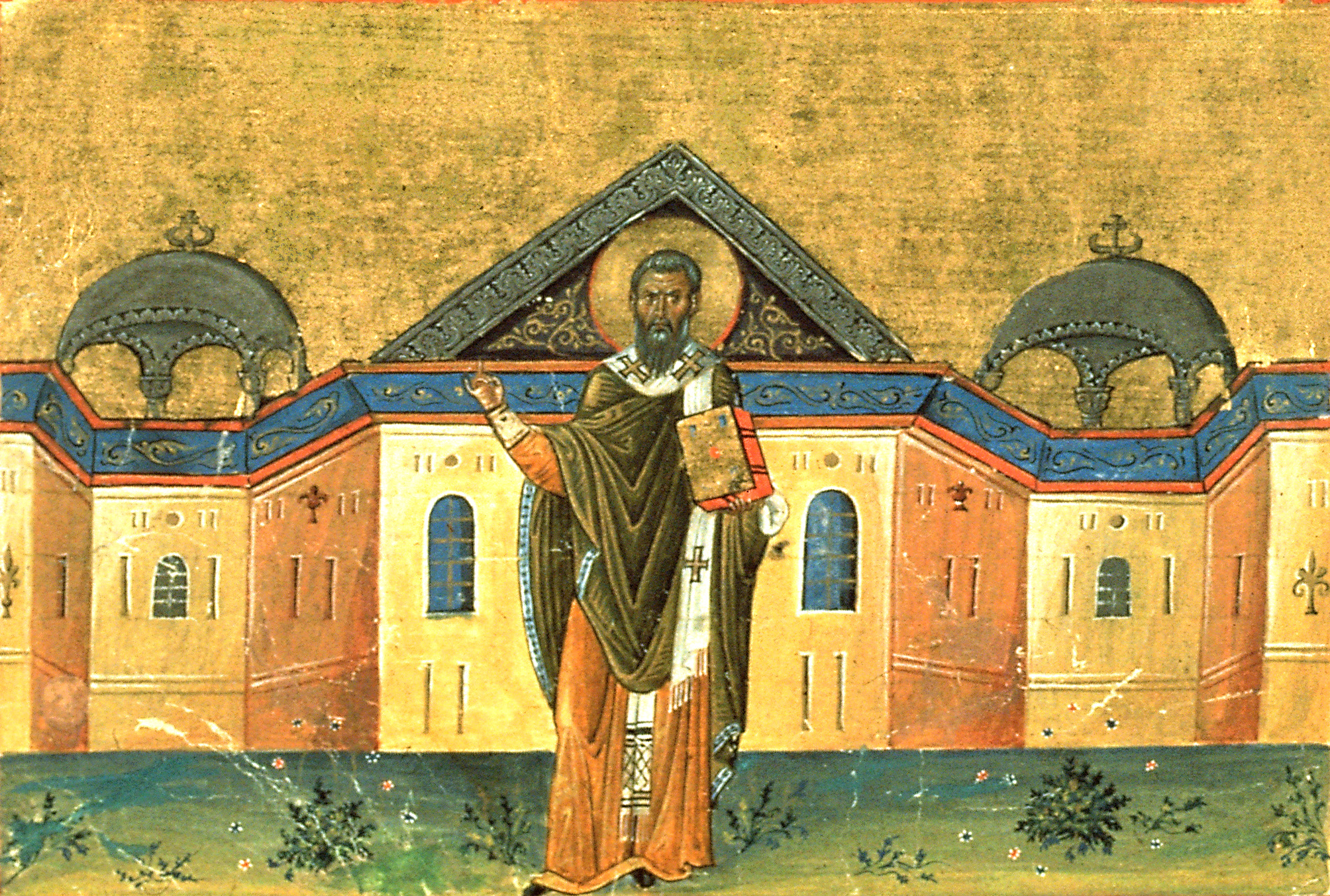 Григорий Нисский Константинополь. 985 г. Миниатюра Минология Василия II. Ватиканская библиотека. Рим.